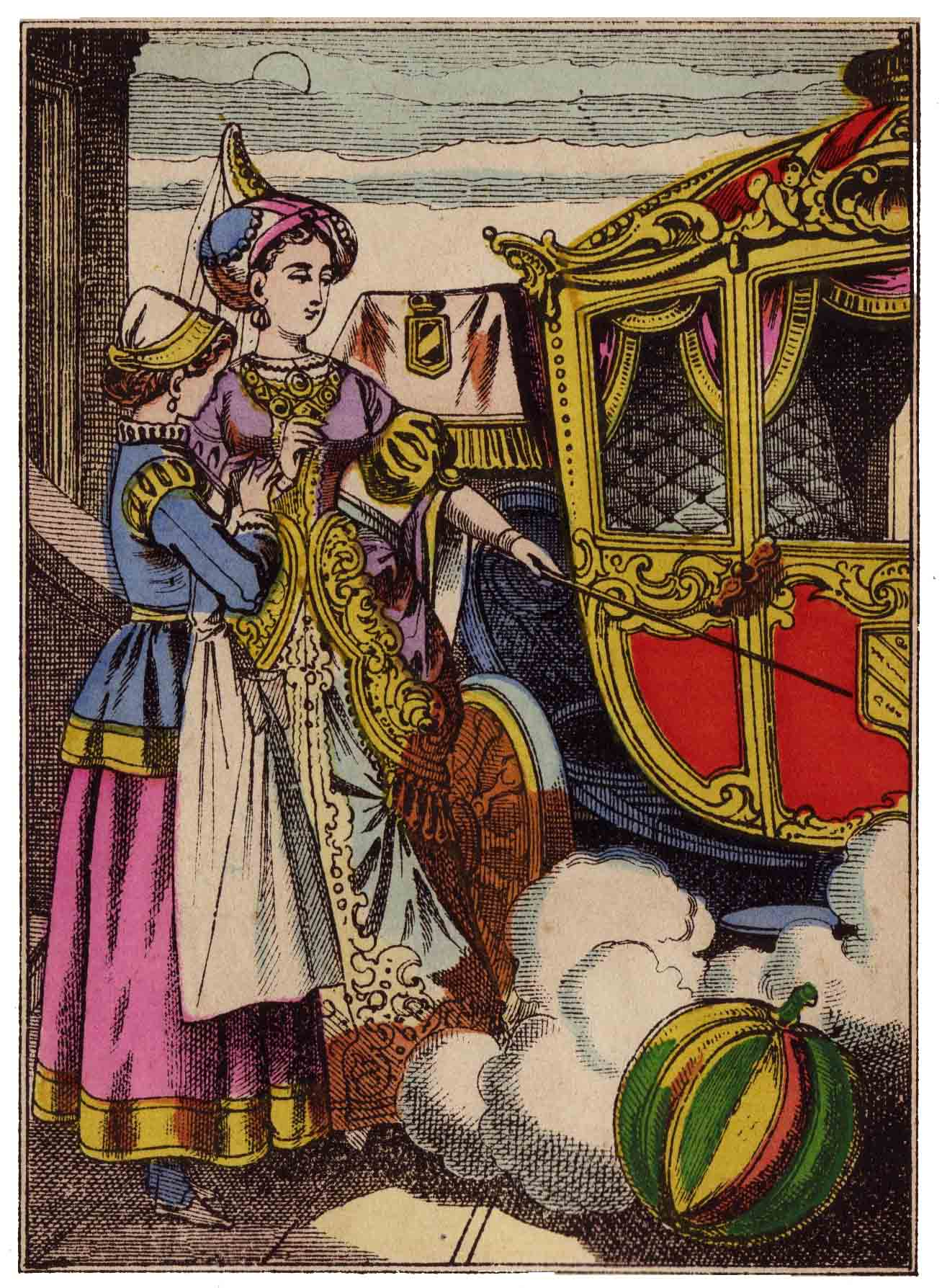 Images d'Épinal : Cendrillon